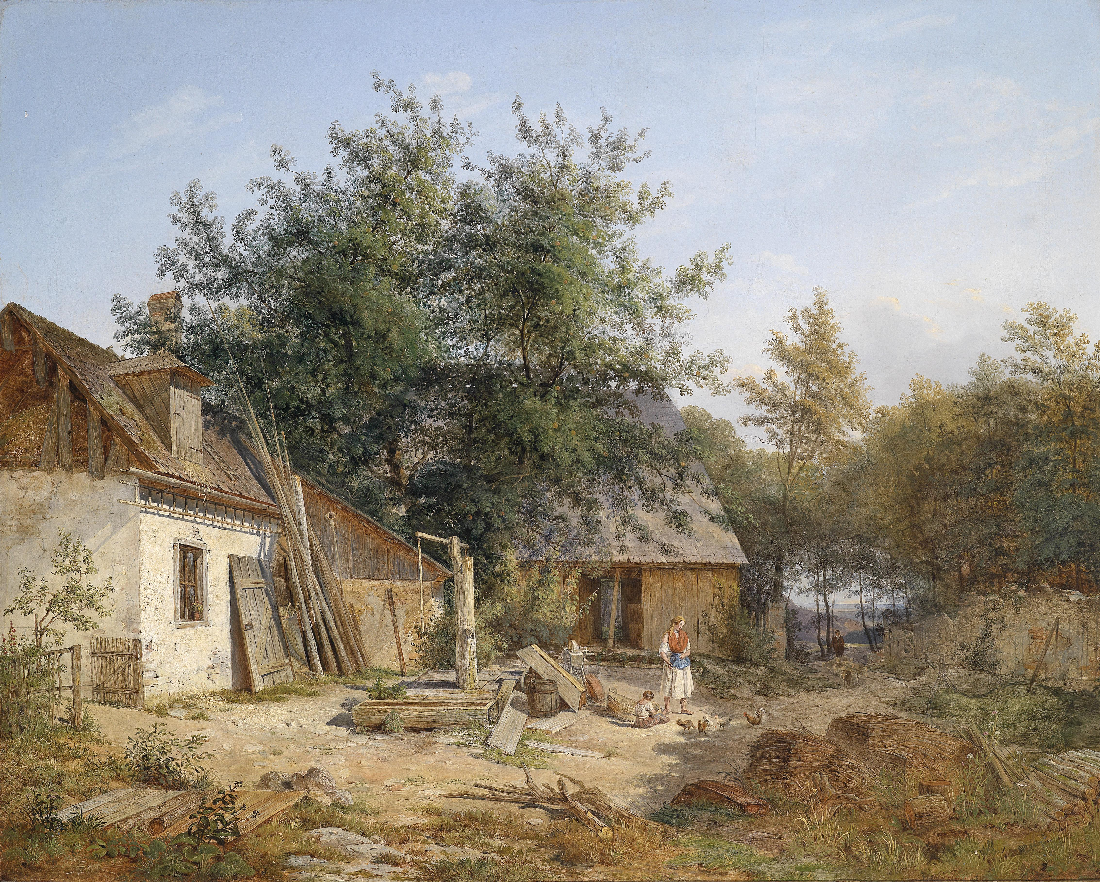 Am Bauernhof, signiert Peyer, Öl auf Leinwand, 80 x 98 cm